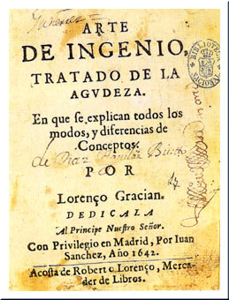 Baltasar Gracián, Arte de ingenio. Tratado de la agudeza, Madrid, Juan Sánchez, 1642.